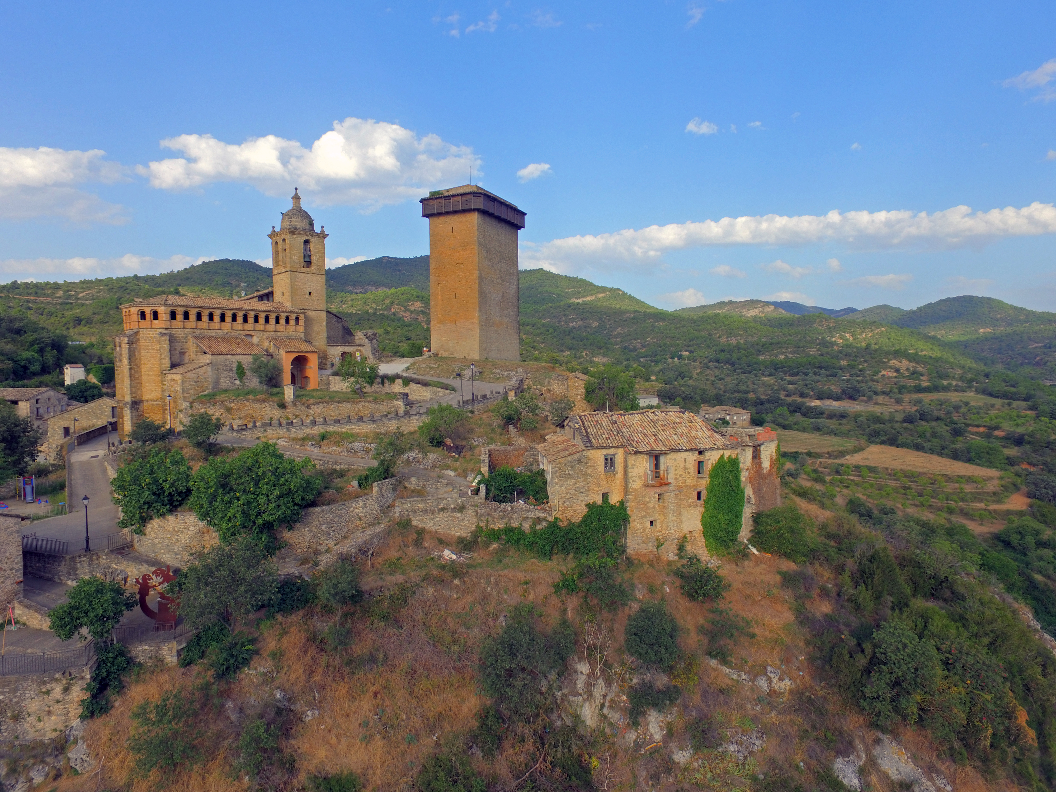 Fotografía aérea del castillo y pueblo de Abizanda.